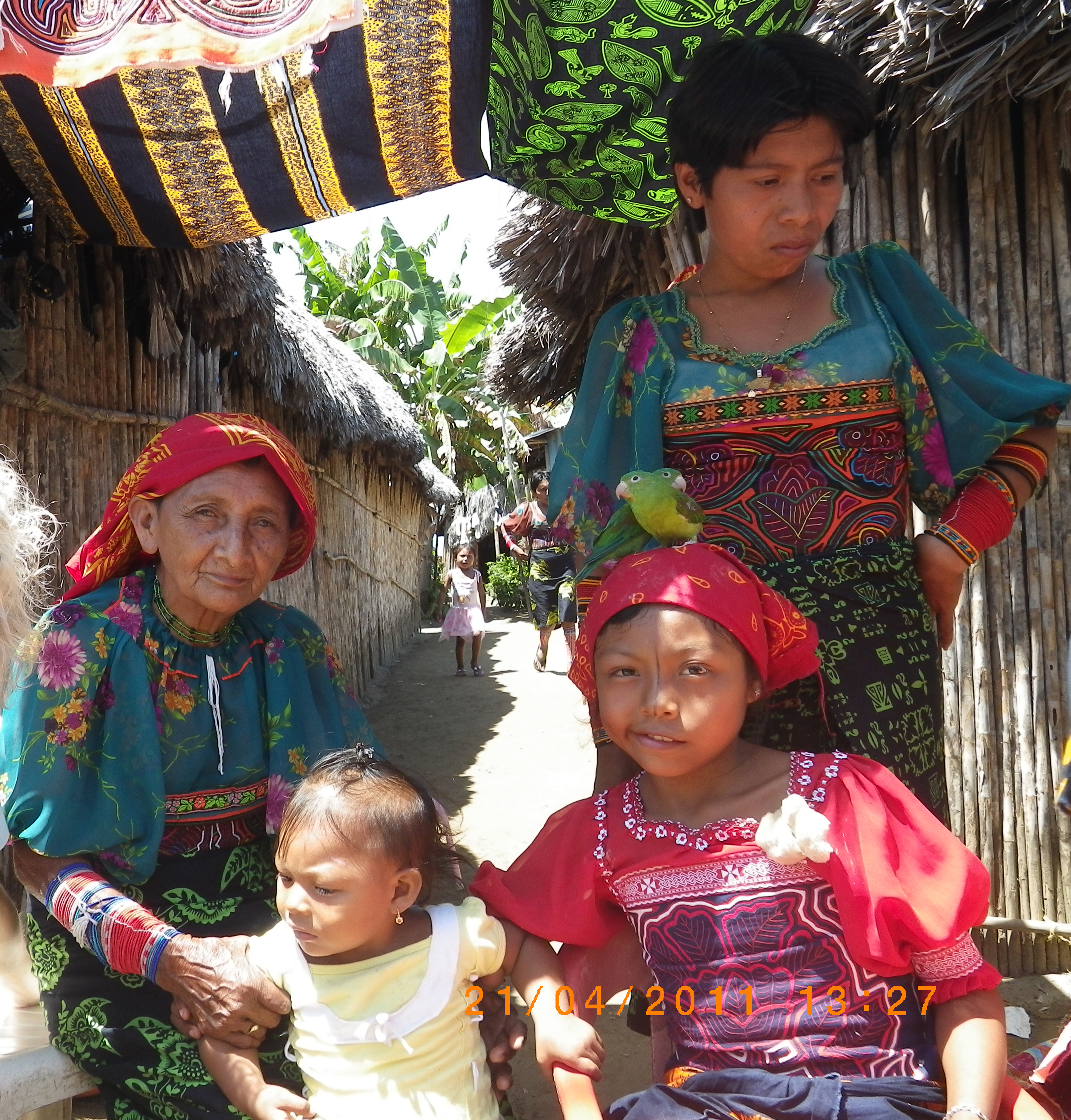 Femmes, enfants, San Blas, Panama, costumes traditionnels